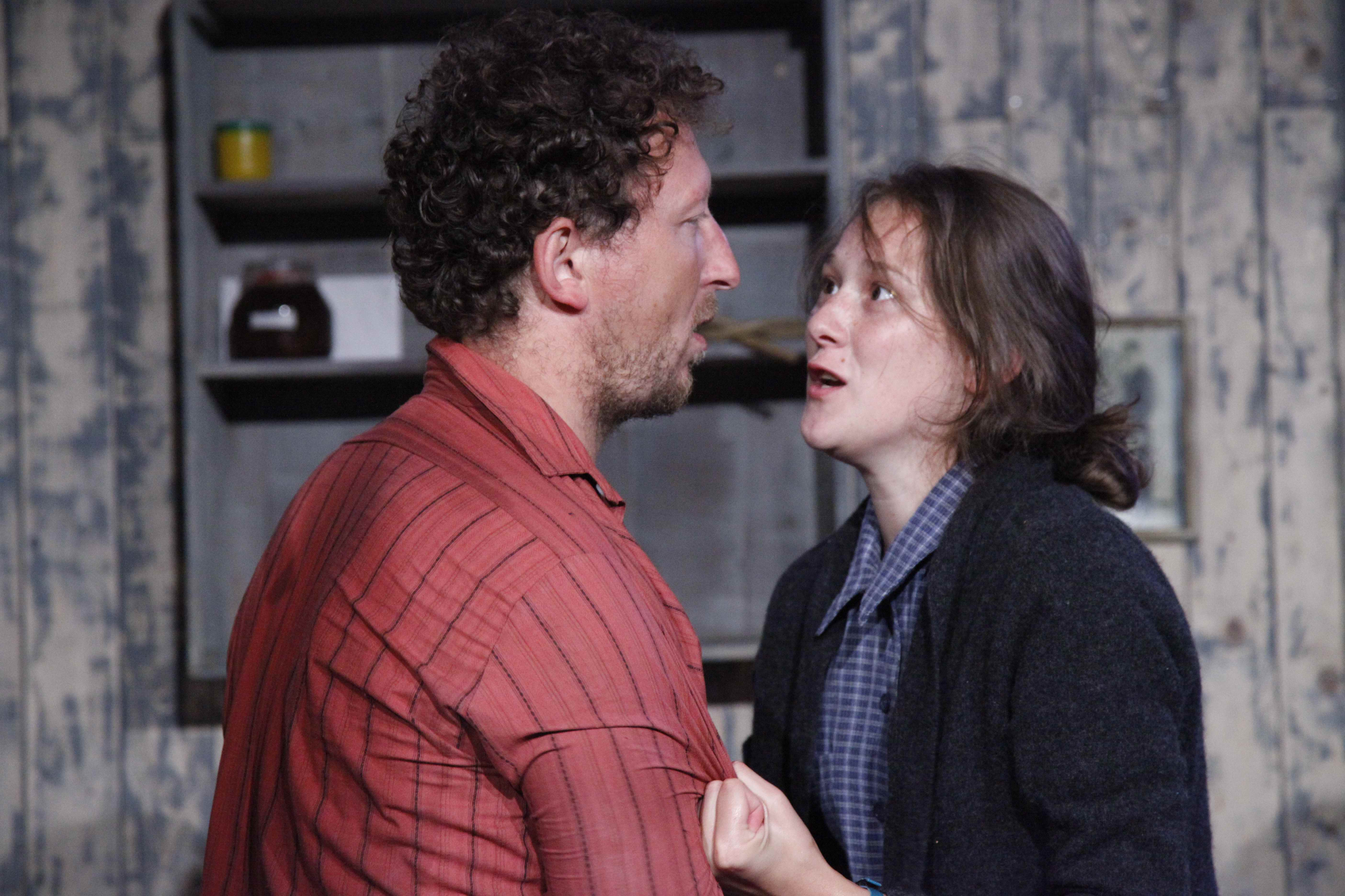 Részlet a Bányavirág c. előadásból, ami nagy sikerrel futott a marosvásárhelyi Nemzeti Színház repertoárjában. A képet a Wikipédia illusztrálása gyanánt töltöttem fel.